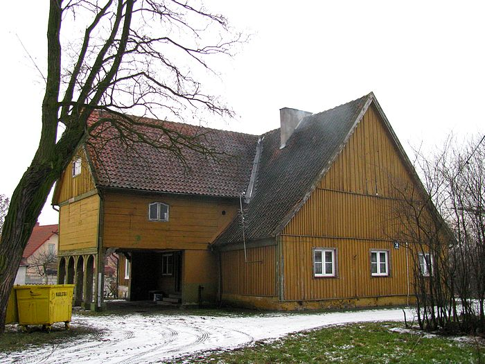 Nowy Dwór Gdański, ul. Morska 74 - dom podcieniowy, kon. XVIII, 1800, XX